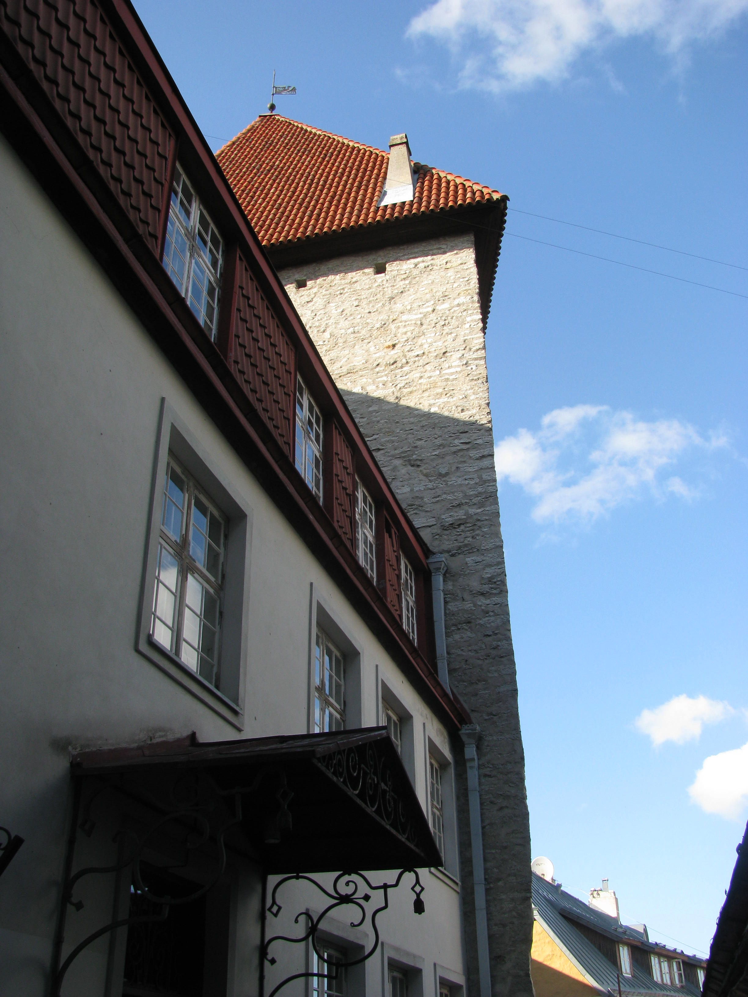 Lühikese jala väravatorn, vaade Taani Kuninga aia väravast.